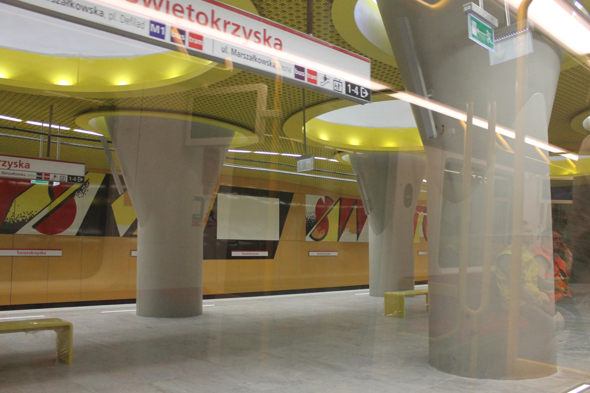 Peron stacji C11 Świętokrzyska.